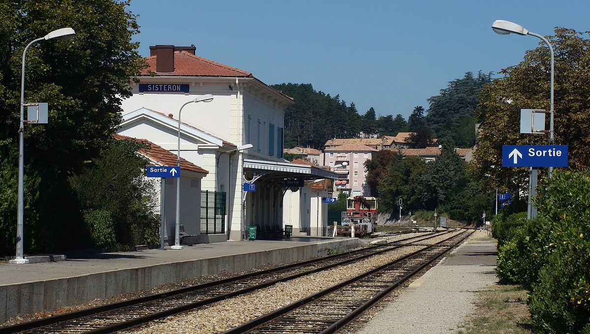 La gare de Sisteron, vue côté voies